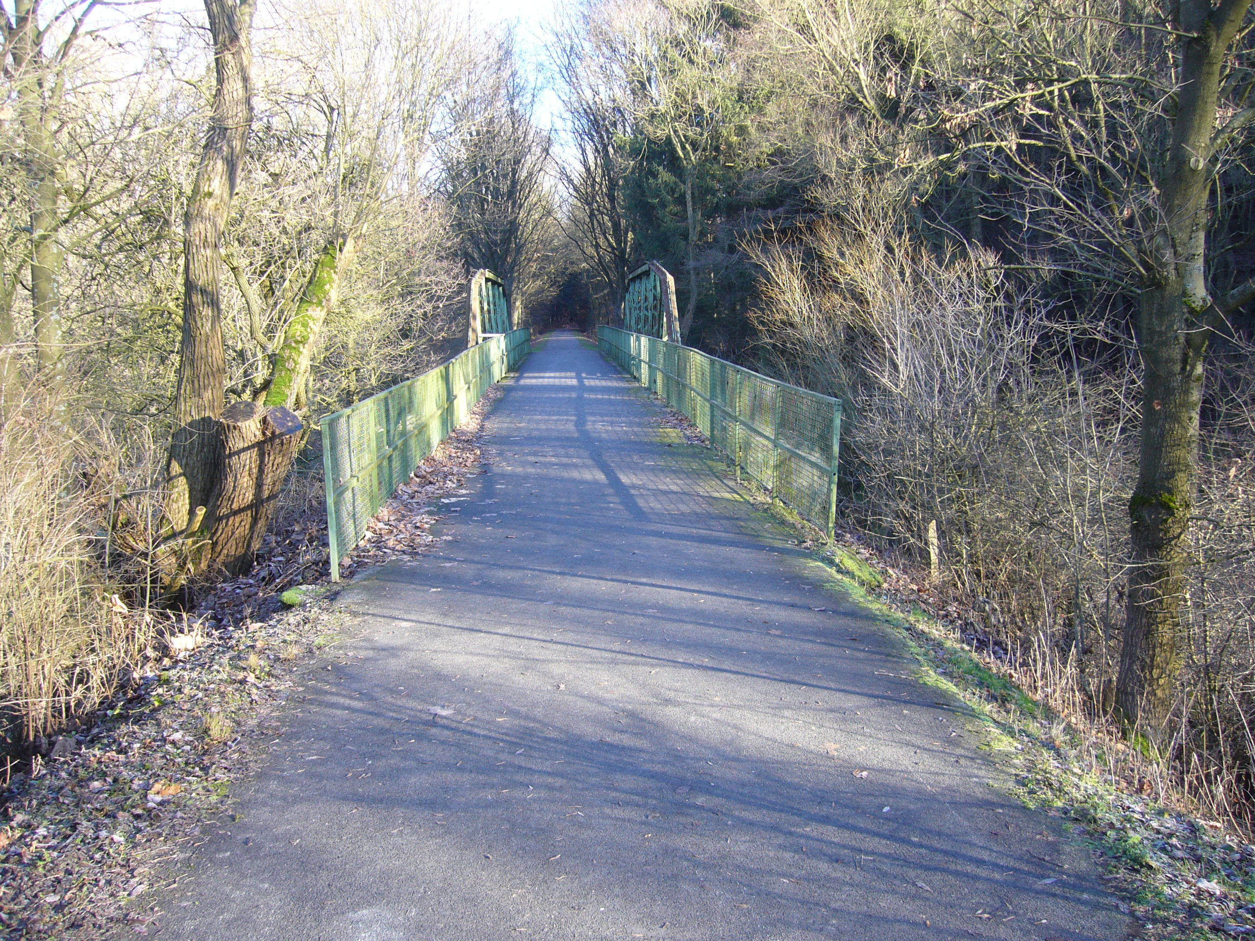 Brücke über die Möhne zwischen Warstein-Niederbergheim und Möhnesee-Völlinghausen auf der alten Möhnetalbahntrasse, heute (fast) durchgehend asphaltierter Radweg